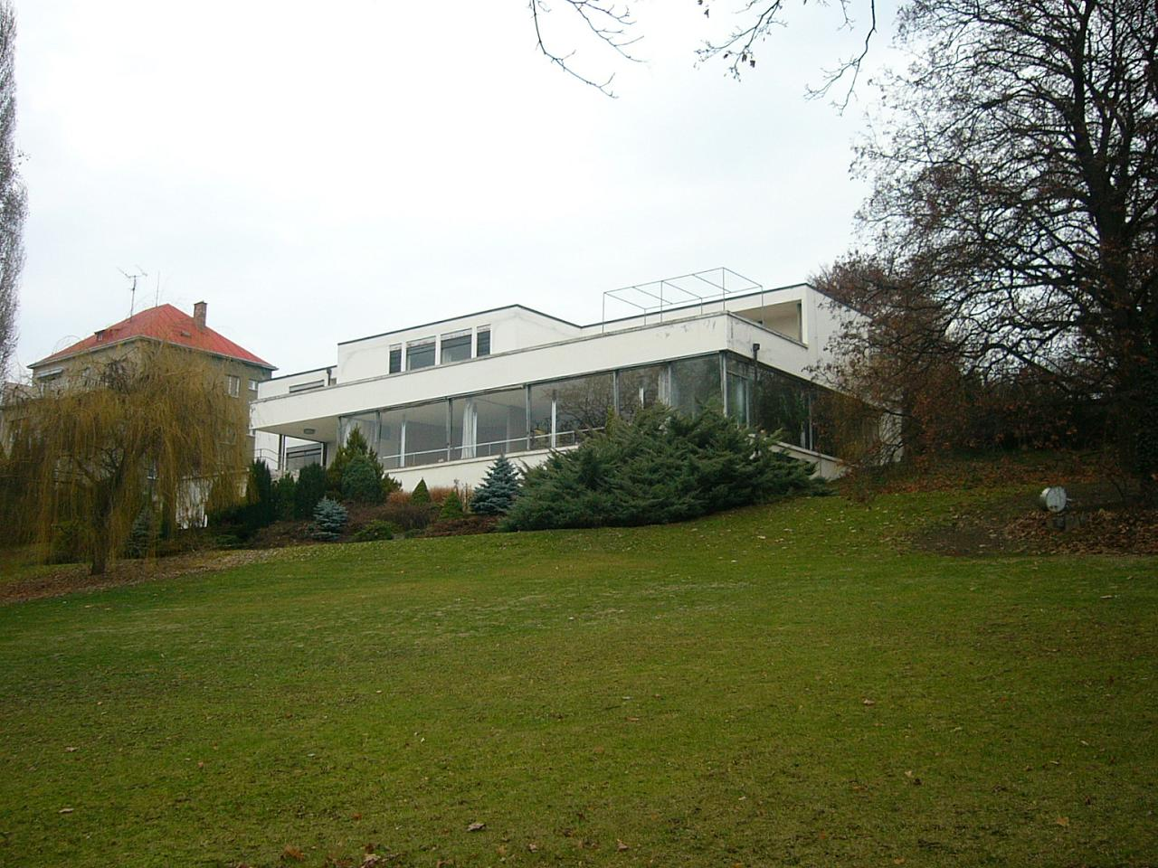 Mies van Der Rohe- Tugendhat House, 1930